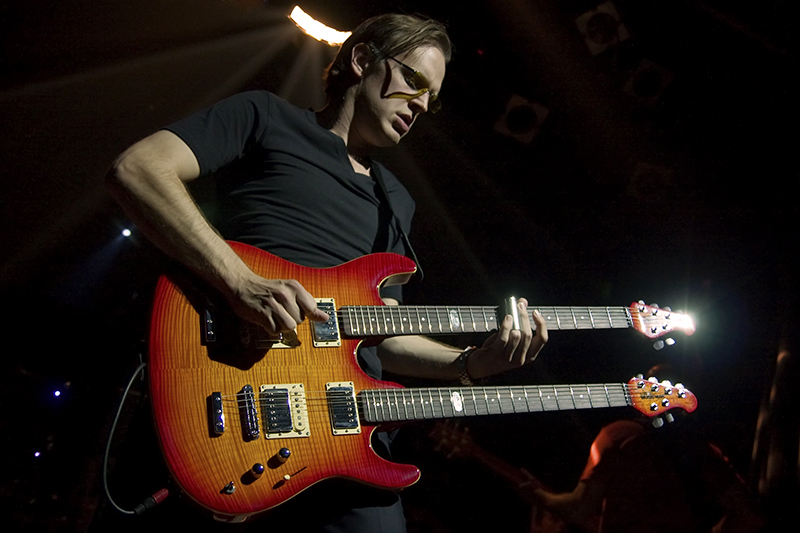 Joe Bonamassa. Sala Heineken (Madrid), 02/06/09